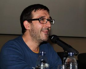 Marcos Prior